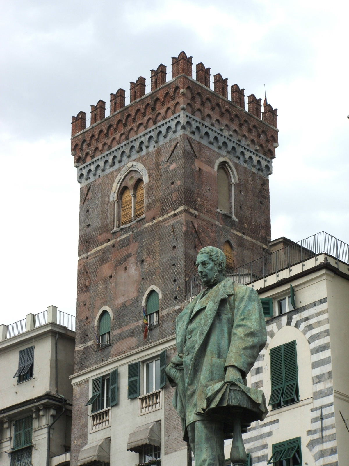 Genova, immagine dal porto antico, piazza Caricamento